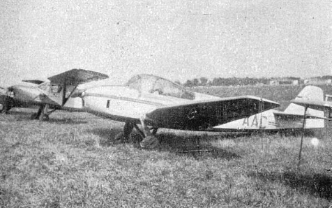 LWD Żak-3, prototyp (SP-AAC)